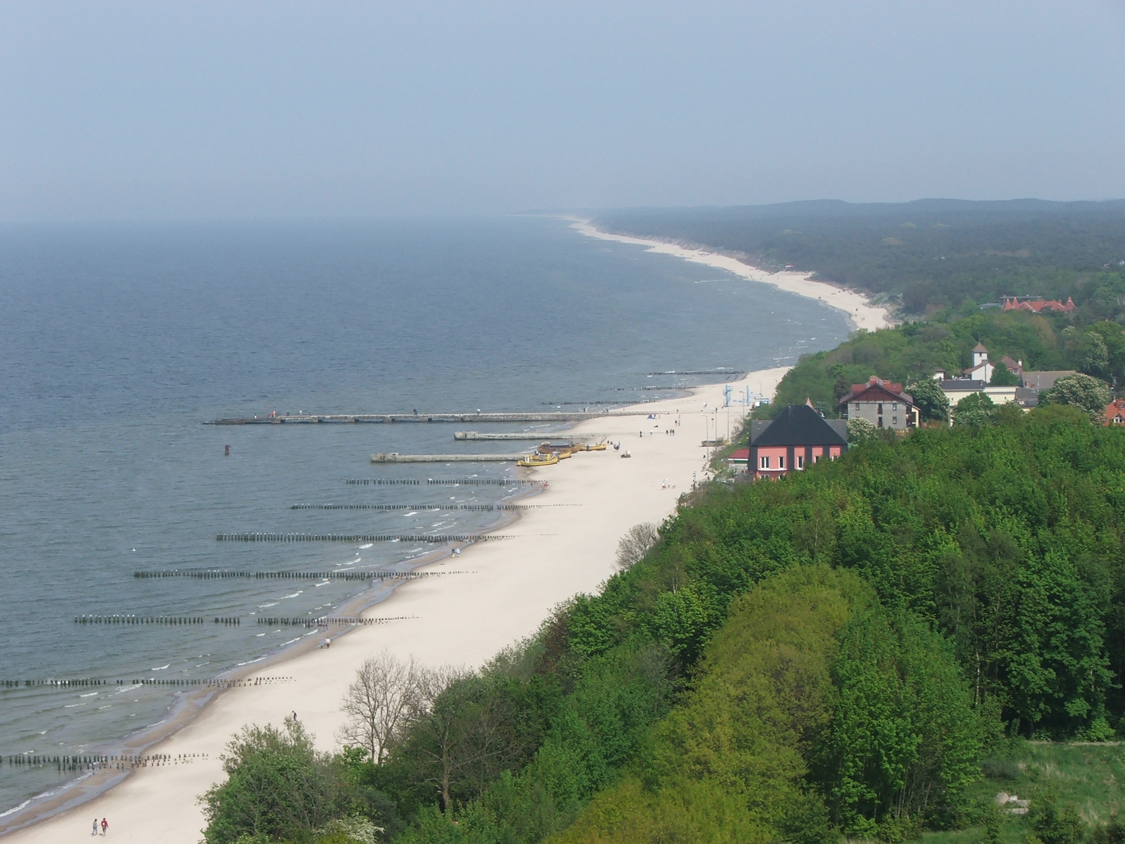 Widok z latarni w Niechorzu